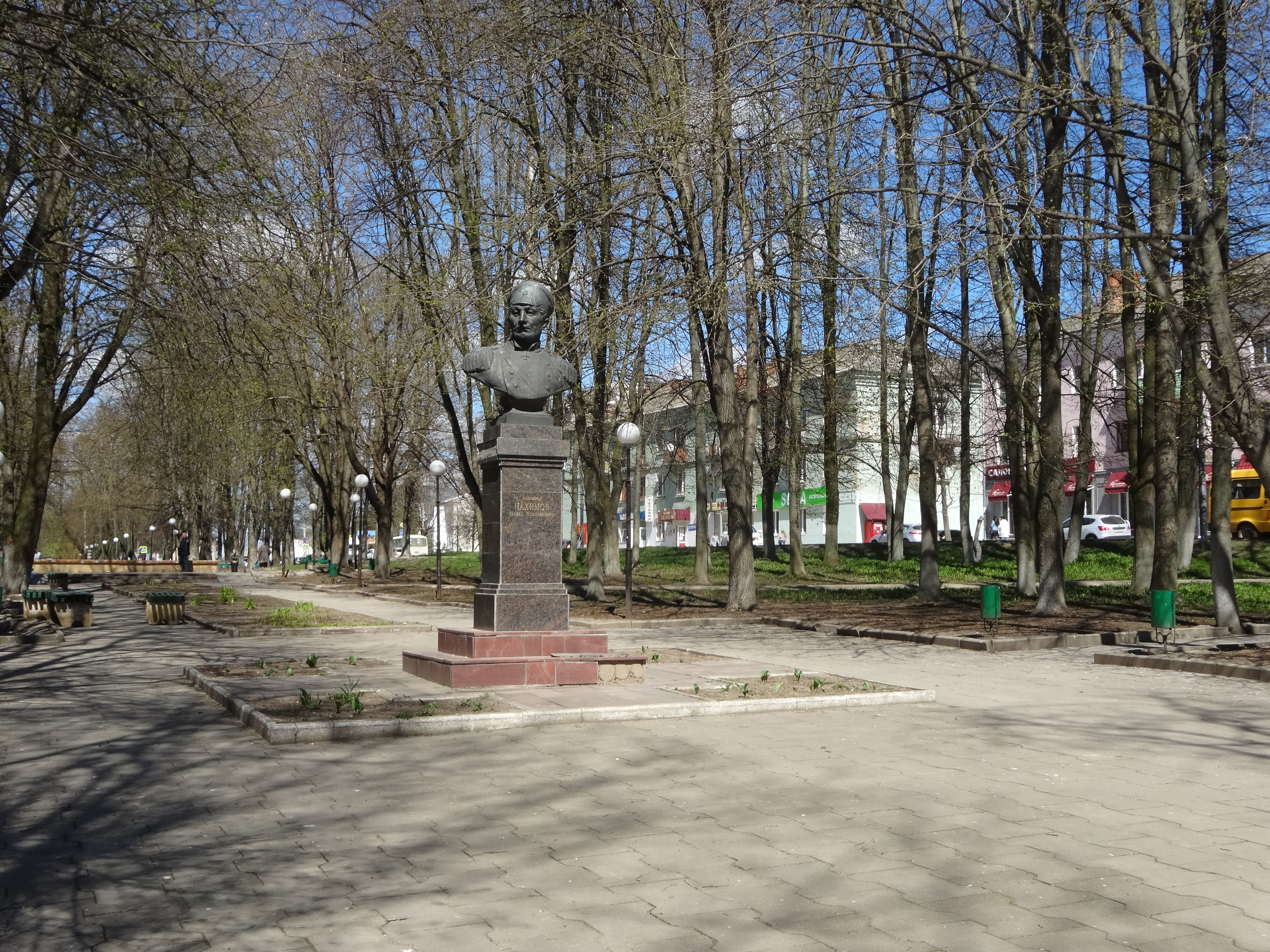 памятник-бюст адмирала Нахимова